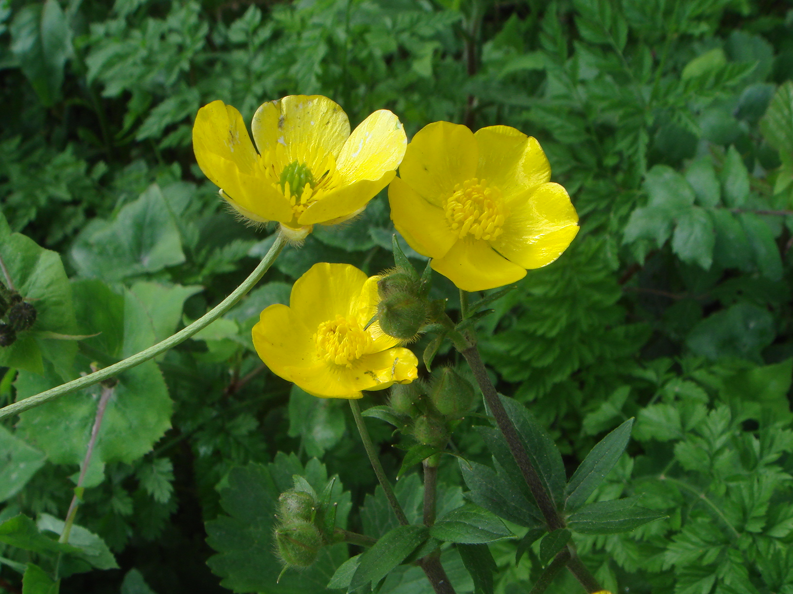 Botón de oro (Ranunculus macrophyllus), Ceuta, España